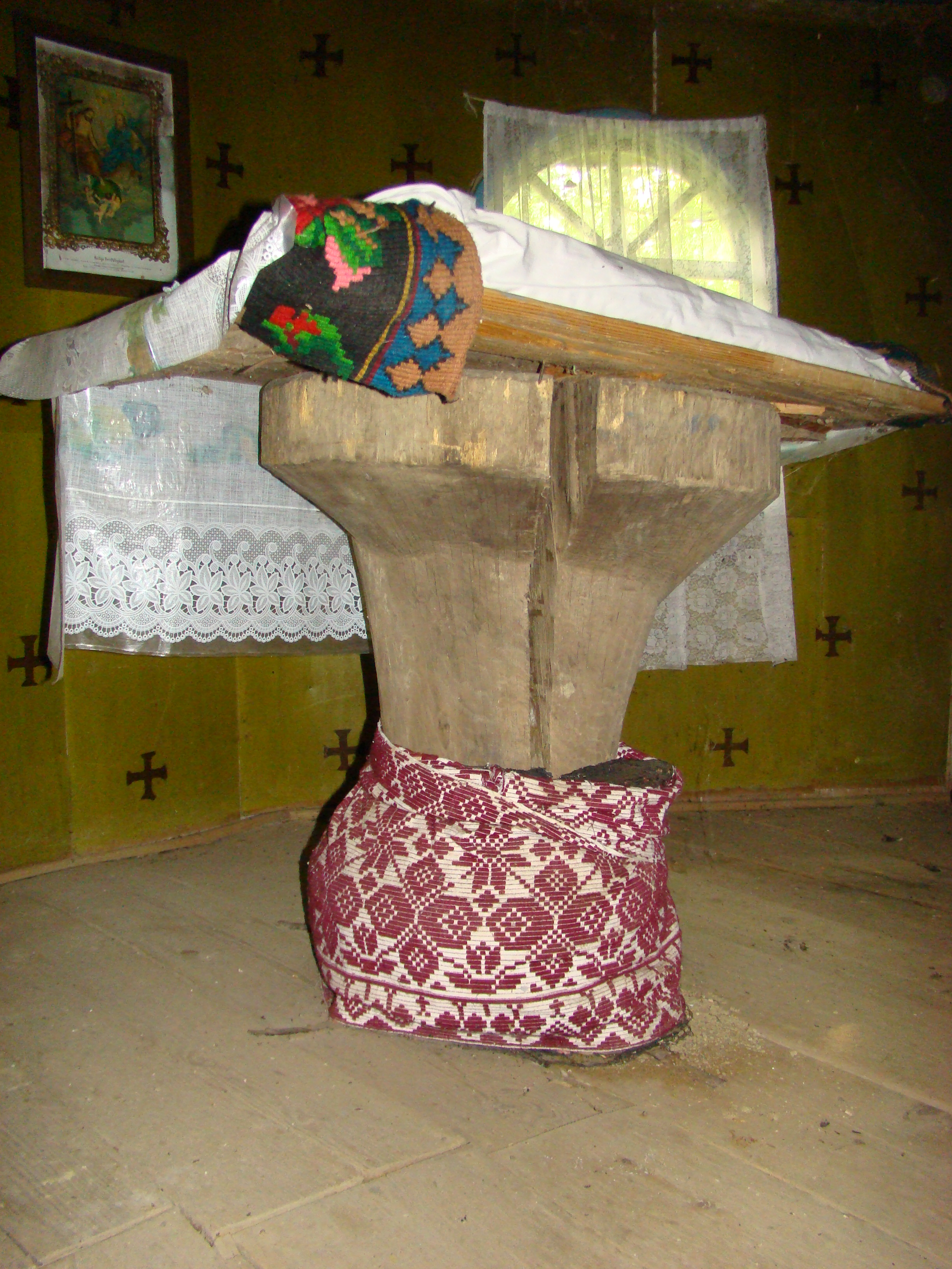 Biserica de lemn "Sf. Ioan Botezătorul" , sat COMLOD; comuna MILAŞ